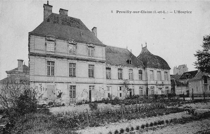 Château de la Rallière, ancien hospice